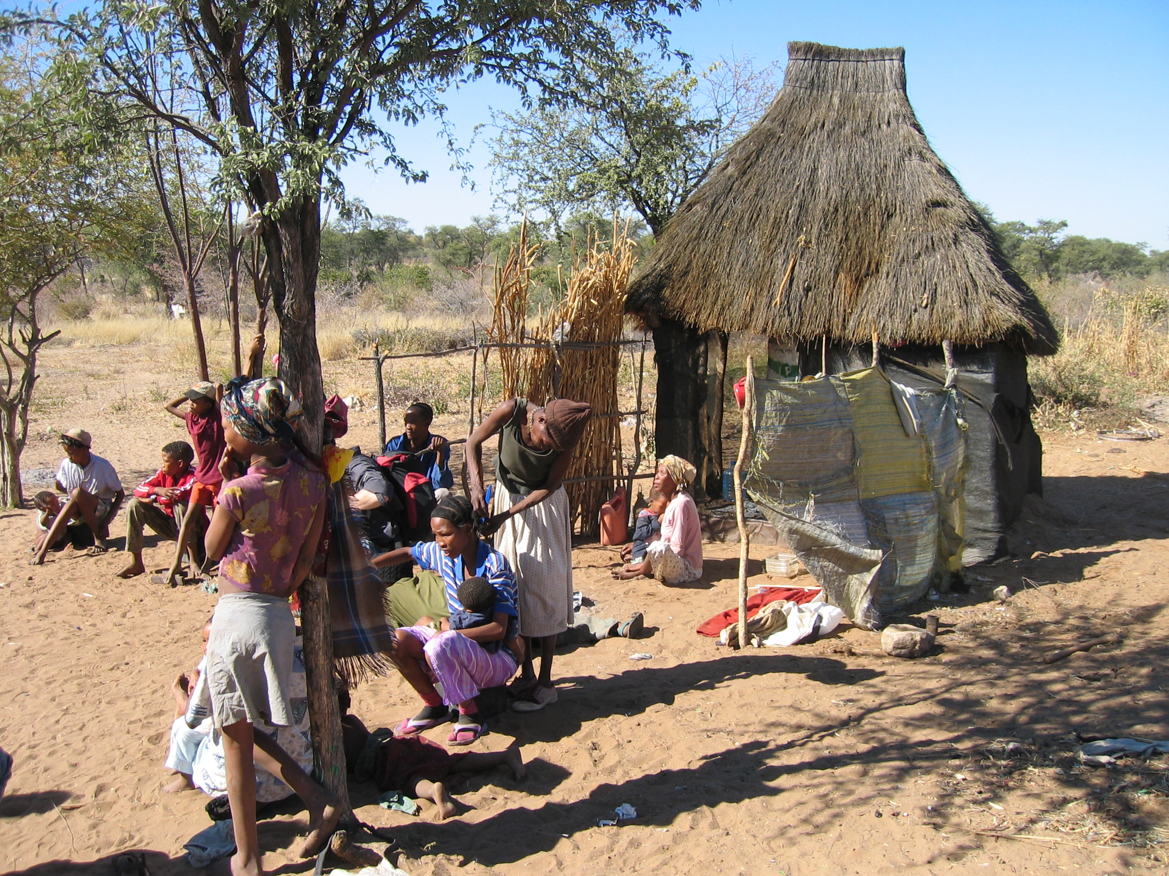 Nederzetting van een paar families Bosjesmannen (San) in Namibië. Eigen foto. zomer 2005